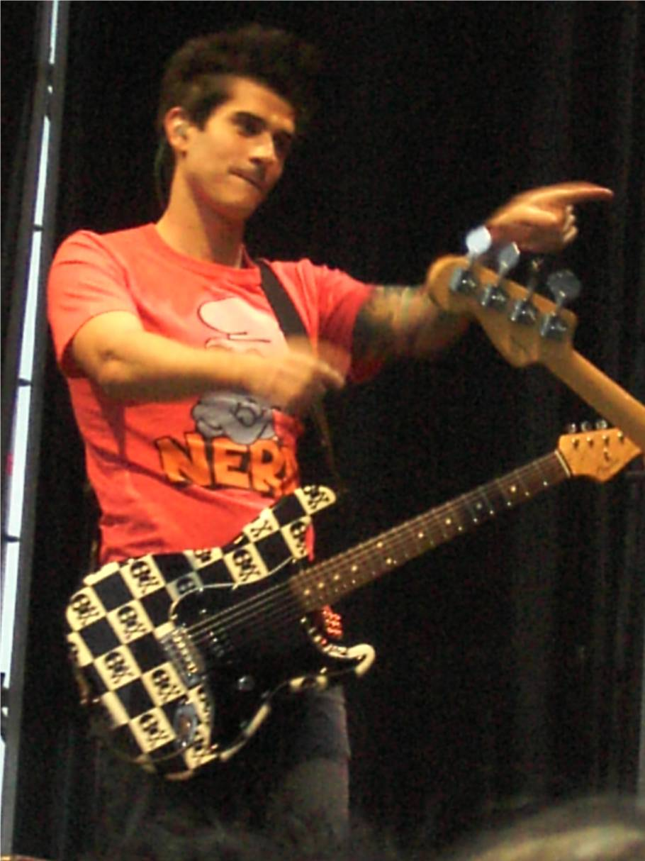 Àlvaro, cantant de Pignoise